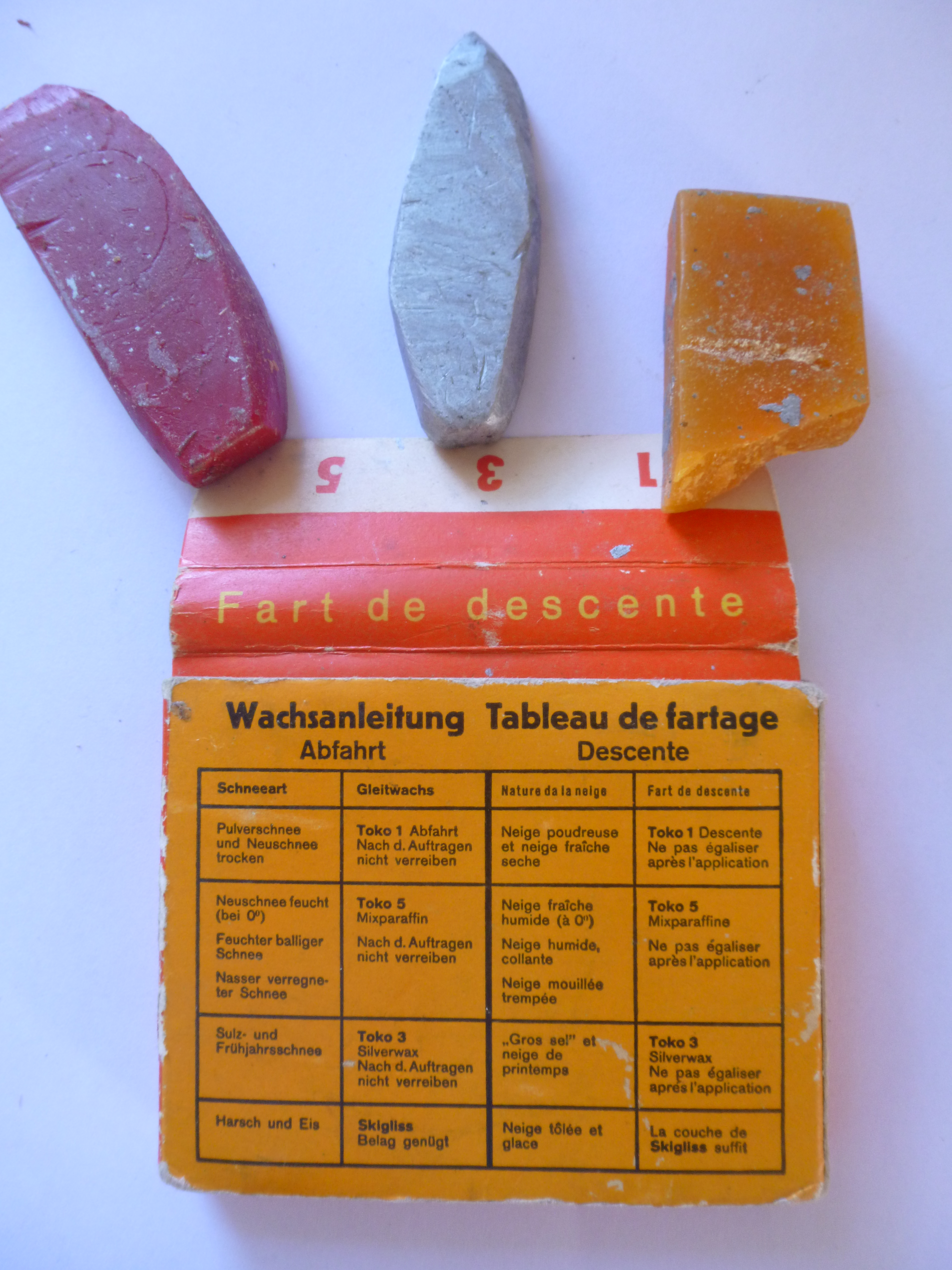 Toko Skiwachs unbekanntes Herstellungsdatum